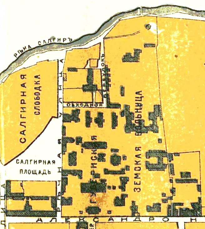 Фрагмент плана города Симферополя из путеводителя Москвина. 1914 год. План губернской земской больницы.